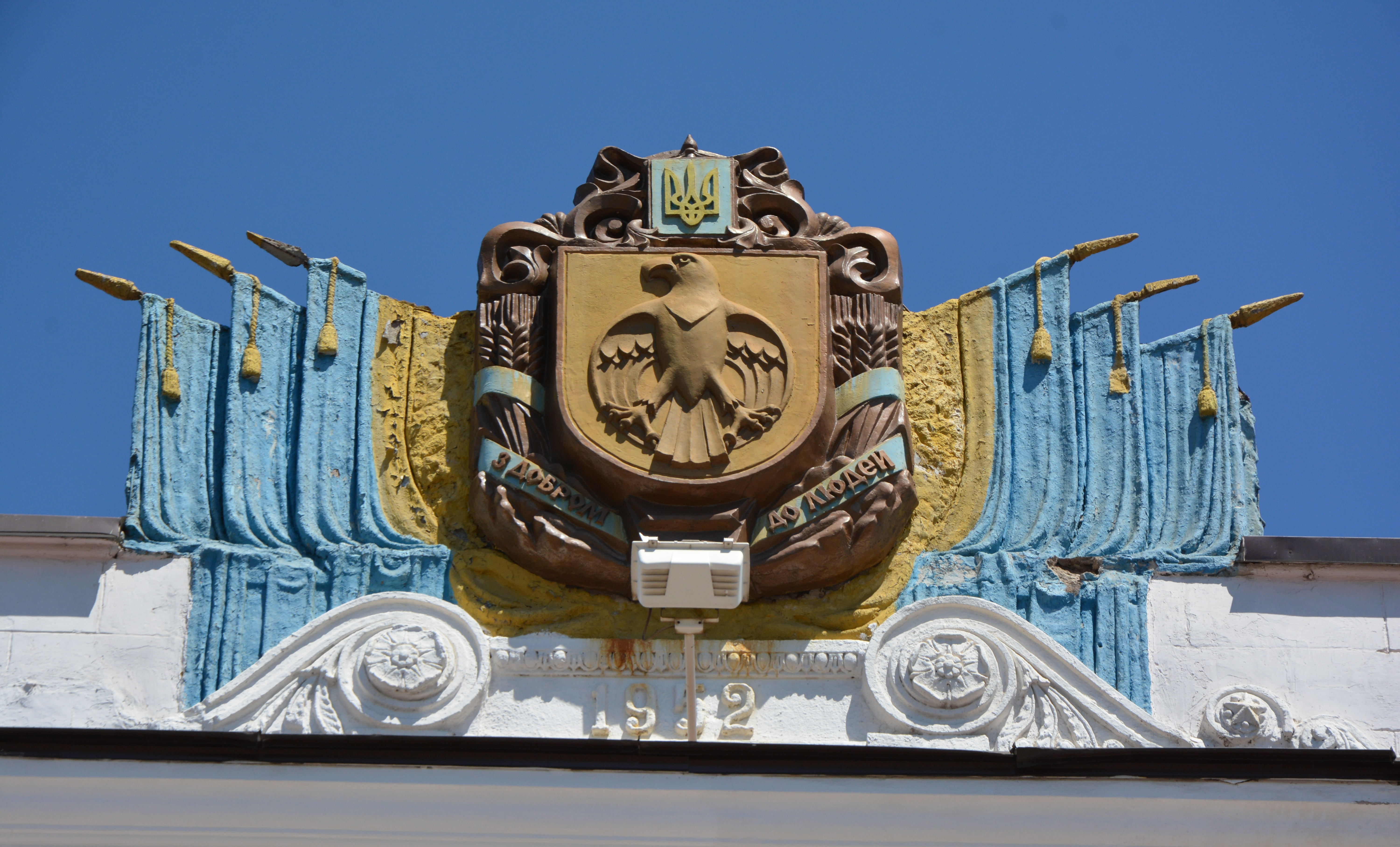 Залізничний вокзал, Знам'янка, вул. Привокзальна. На гербі зображений скіфський орел - оскільки Кіровоградська область і Знам'янський район зокрема надзвичайно багаті на скіфські поховальні кургани, поселення та пам'ятки